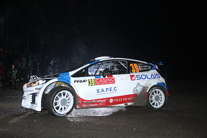 Eric lors du shakedown du Monte Carlo 2015